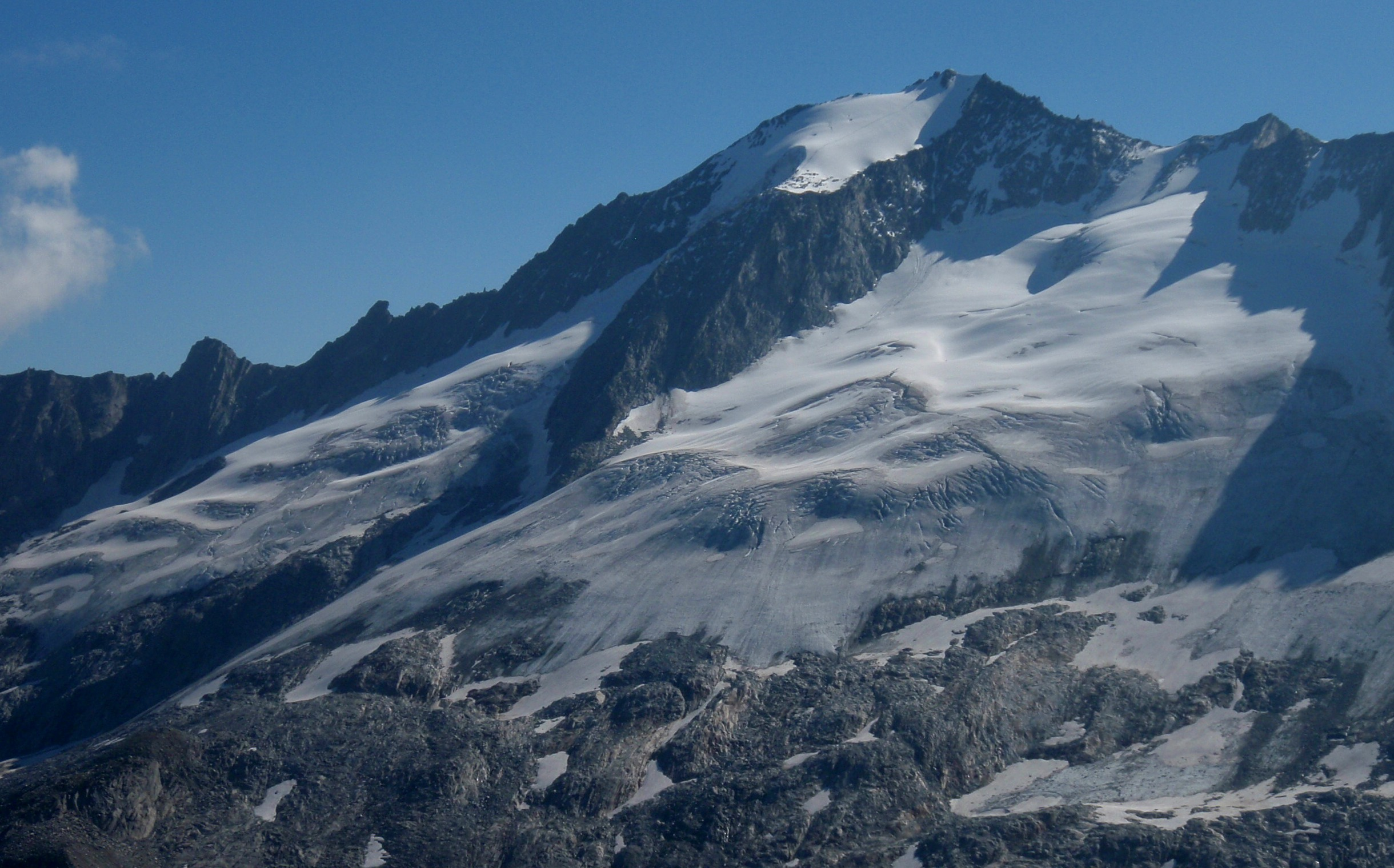 Großer Möseler (italienisch: Grande Mèsule) in den Zillertaler Alpen vom Schlegeiskees (WSW Richtung)